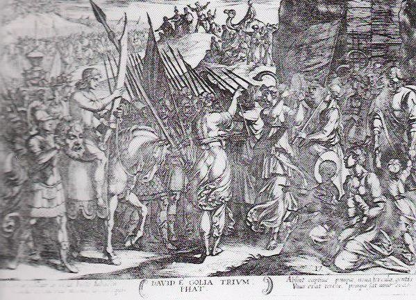 Antonio Tempesta, Triumphh des David, Kupferstich